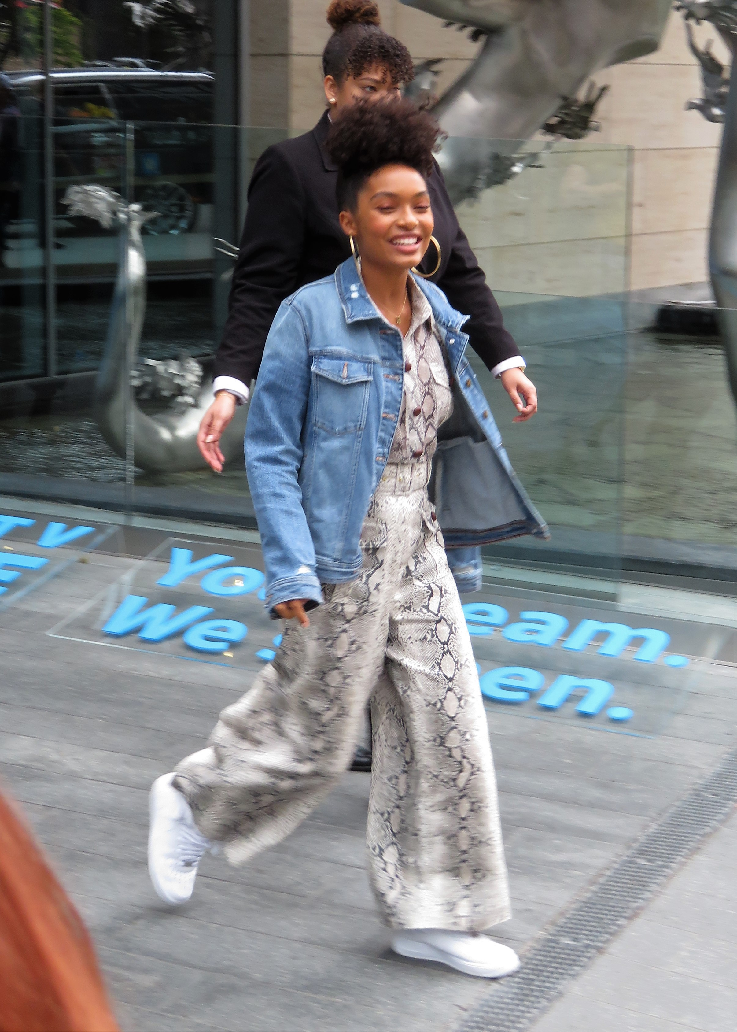 Yara Shahidi